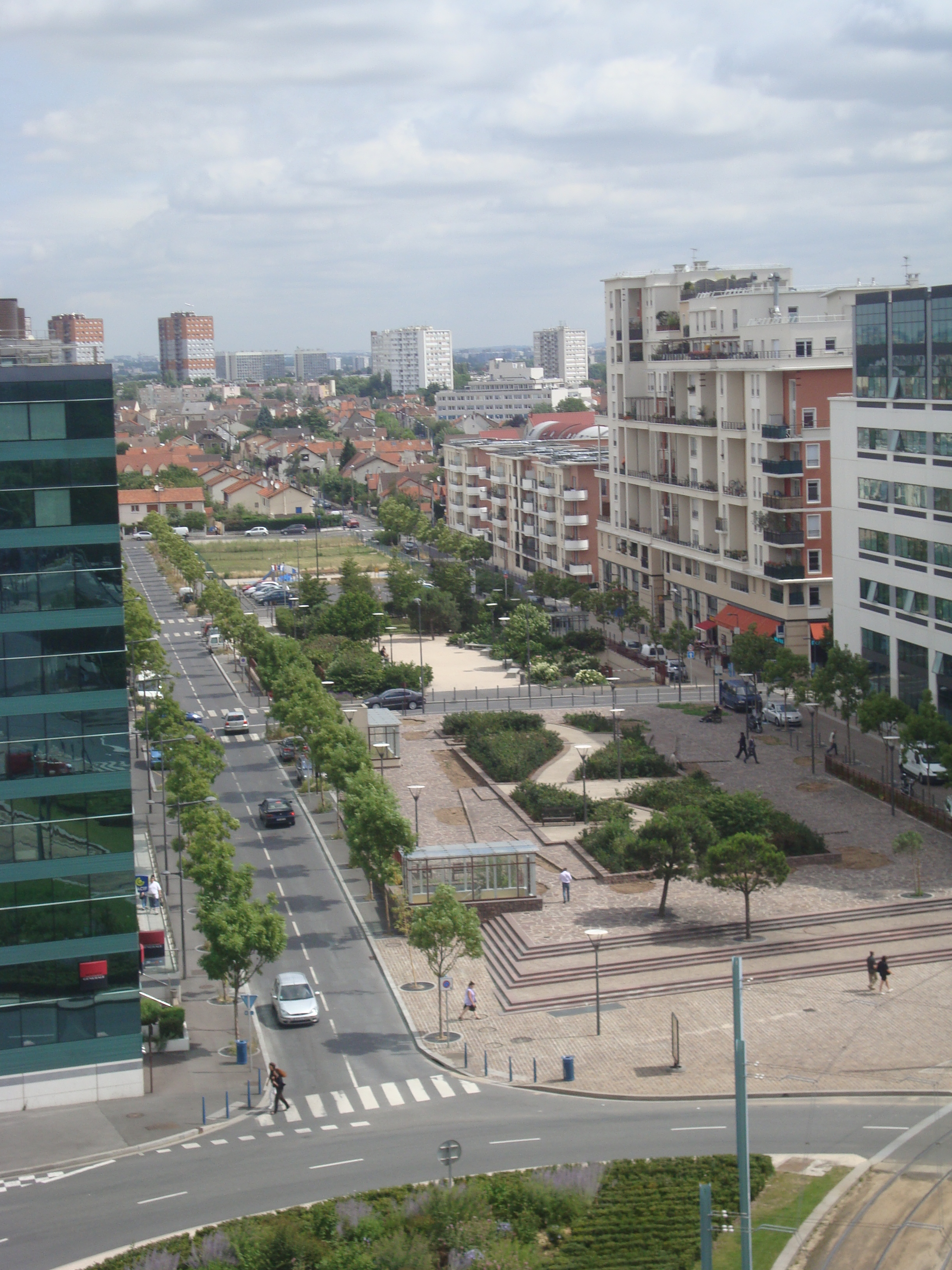 L'esplanade Jean Rostand à Bobigny.